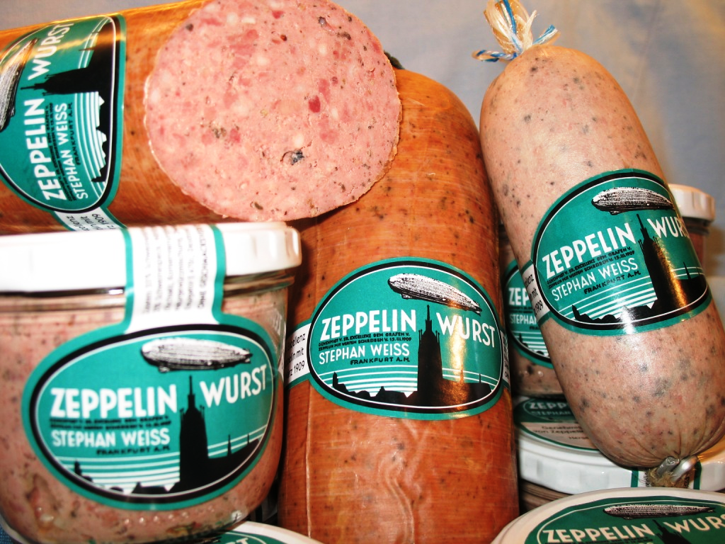 Die verschiedenen Formen der Zeppelinwurst als geräuchert im Naturdarm (auch angeschnitten), ungeräuchert im Kunstdarm und als Glaskonserve. Different forms of product Zeppelinwurst, smoked, unsmoked and in can.